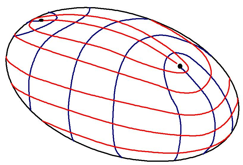 lines of curvature of an ellipsoïd, showing umbilic points as singularities